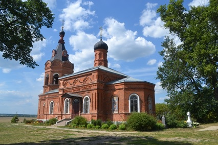 Фото храма Вмч. Димитрия Солунского в селе Дуброво Наро-Фоминского р-на Московской области